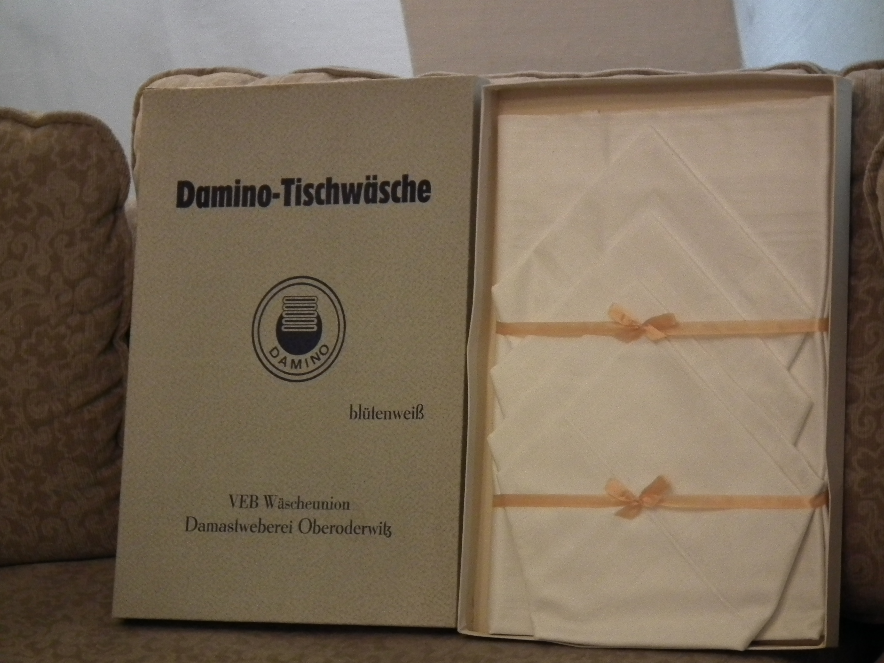 DDR Museum Zeitreise Radebeul, Damino-Tischwäsche, VEB Wäscheunion Damastweberei Oberoderwitz, Fotografiert mit Genehmigung der Museumsleitung